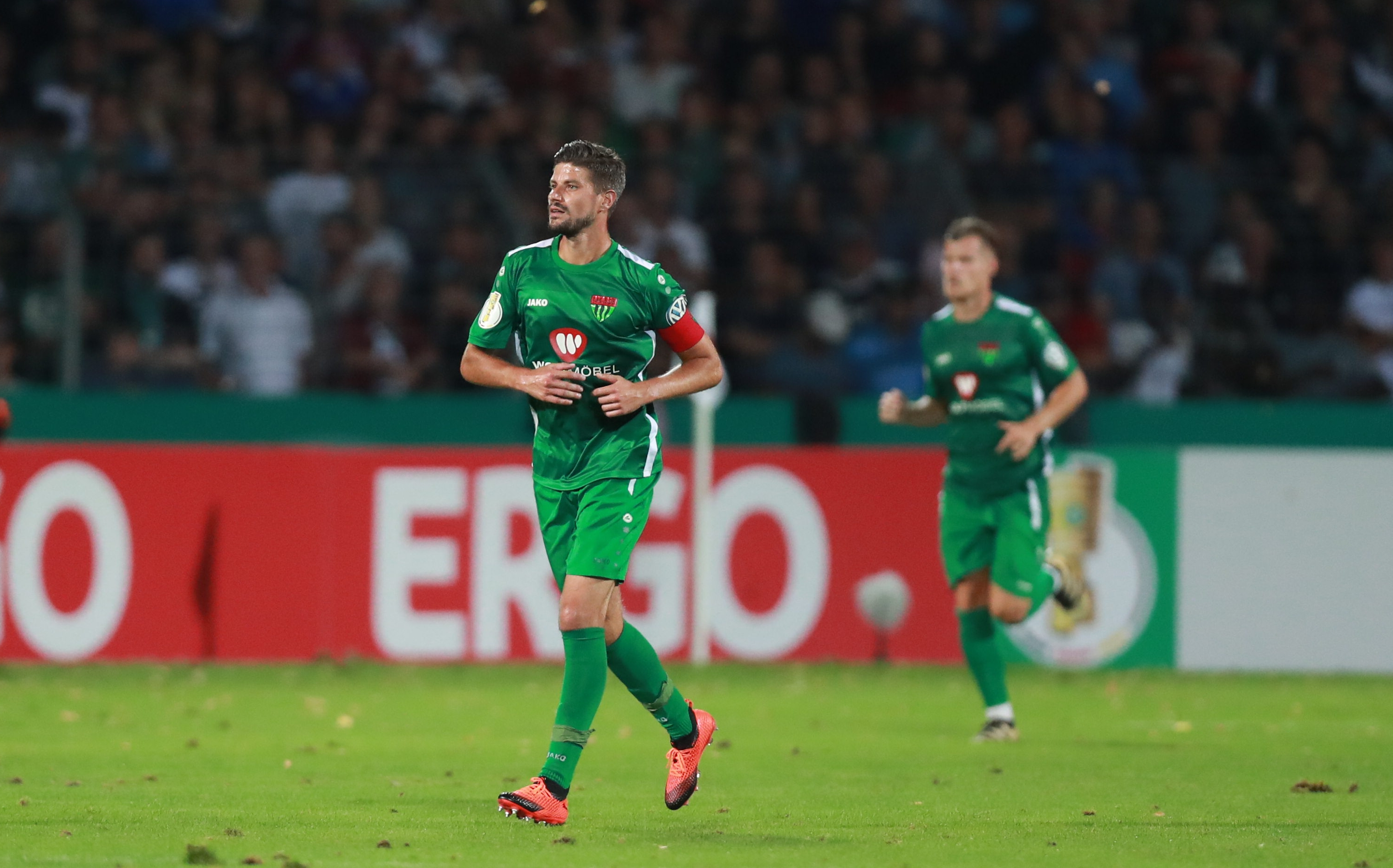 DFB-Pokal 2018/19, 1. Hauptrunde: 1. FC Schweinfurt 05 gegen FC Schalke 04 0:2 (0:1)